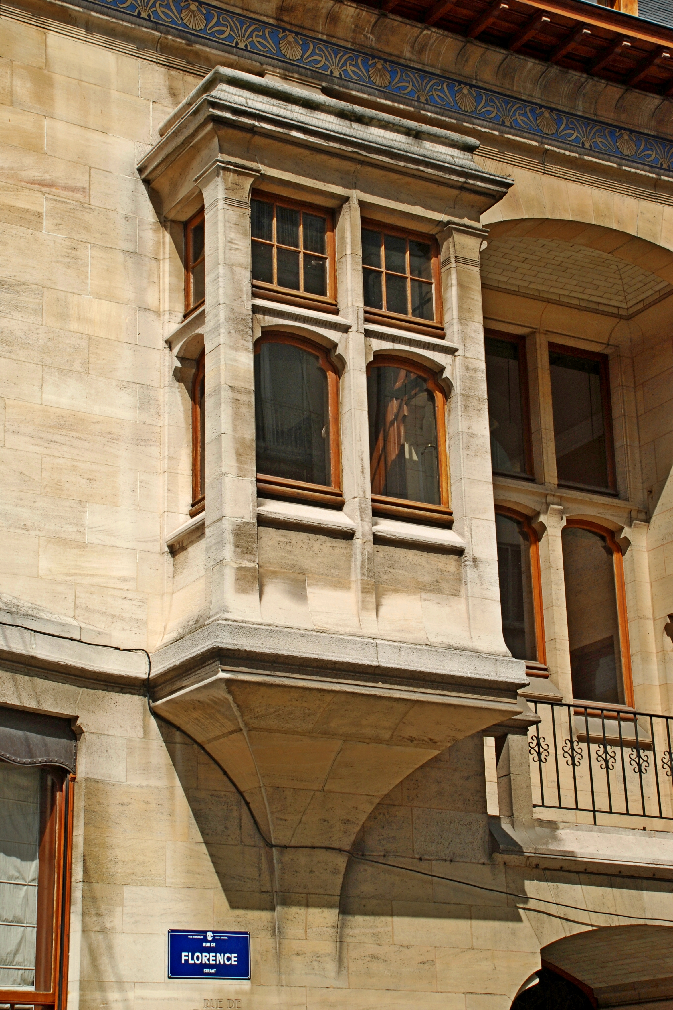 Belgique - Bruxelles - Hôtel Otlet